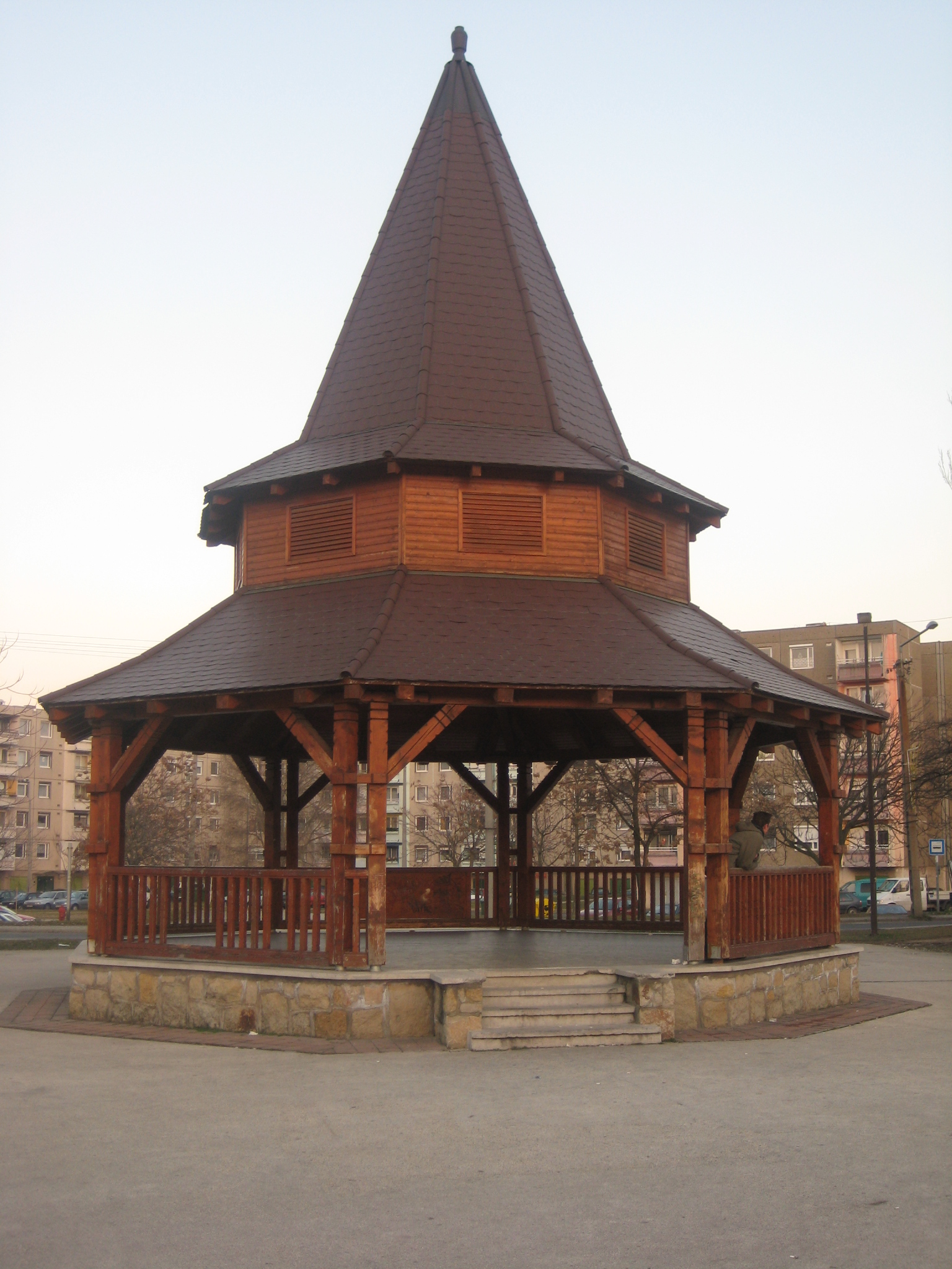 A dorogi Zenepavilon.